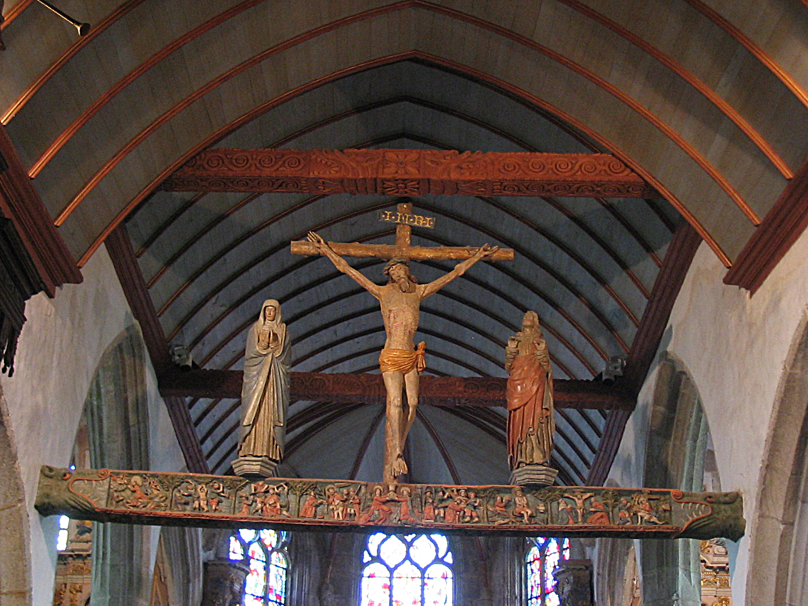 Der Triumphbalken in der Kirche von Lampaul-Guimiliau, Bretagne, Frankreich